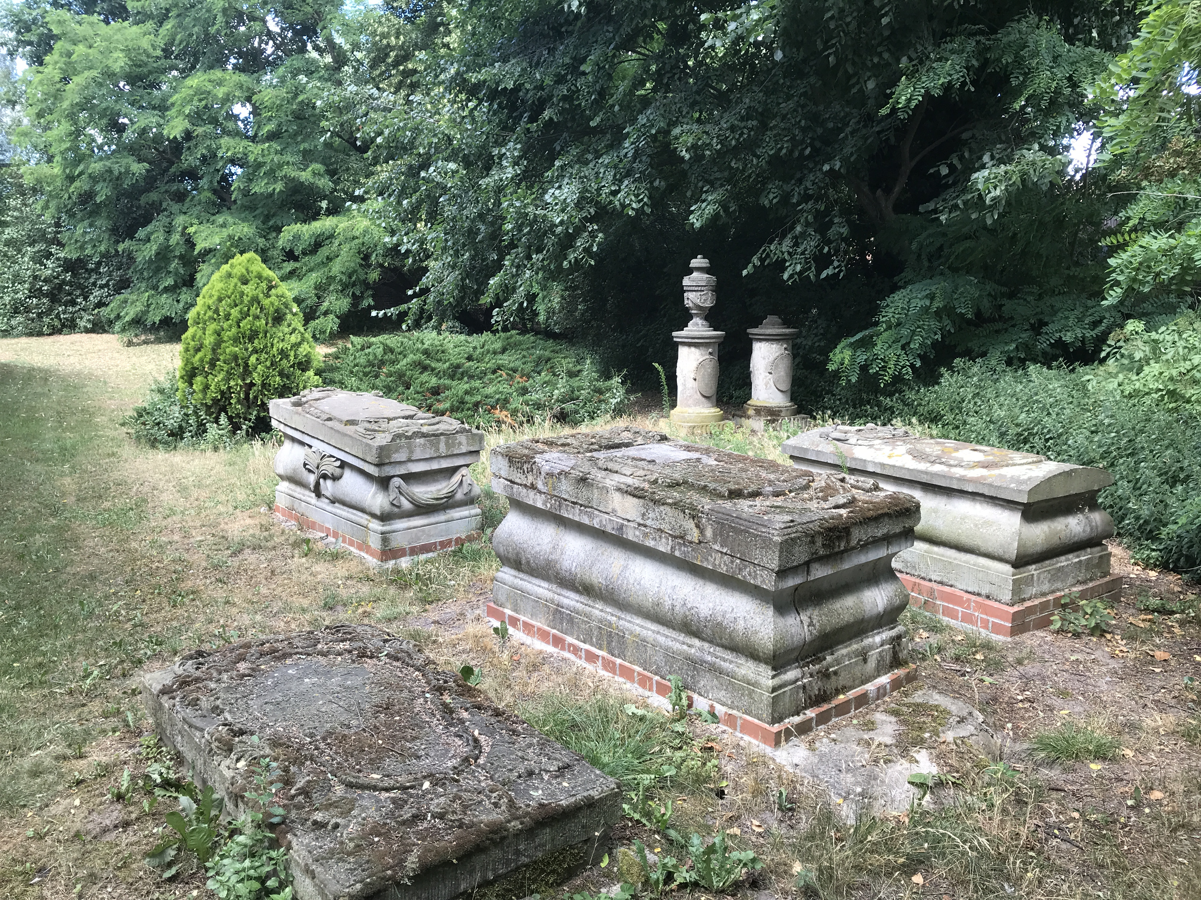 Die Dorfkirche in Altgolßen entstand Anfang des 14. Jahrhunderts und wurde in den Jahren 1899 bis 1902 erheblich umgebaut. Auf dem angrenzenden Friedhof befinden sich bedeutende Gräbdenkmäler aus den Patronatsfamilien des 18. und 19. Jahrhunderts.